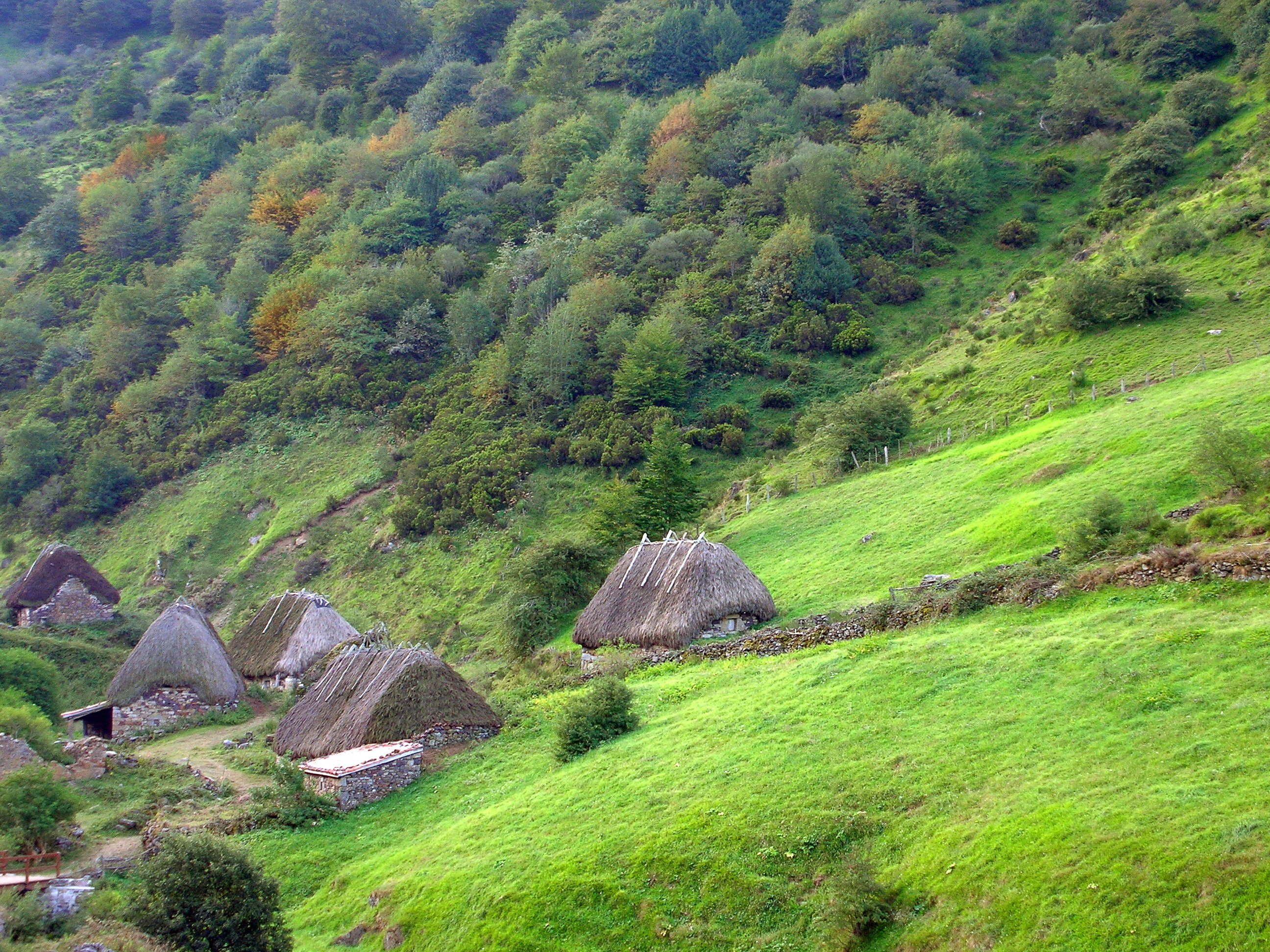 Villar de Vildas, a 75 kilómetros de la ciudad de Oviedo y situado en el Valle del Pigüeña, marca el inicio del camino hasta uno de los rincones más increíbles del Principado de Asturias. Solo nos separa una ruta de seis kilómetros hasta llegar a la Braña de la Pornacal, en el Parque Natural de Somiedo y disfrutar de la belleza de uno de los núcleos mejor conservados de la zona. Rodeados de prados y cumbres nos invade una mezcla de colores vivos que nos hacen sentir como en una fotografía. Leer más